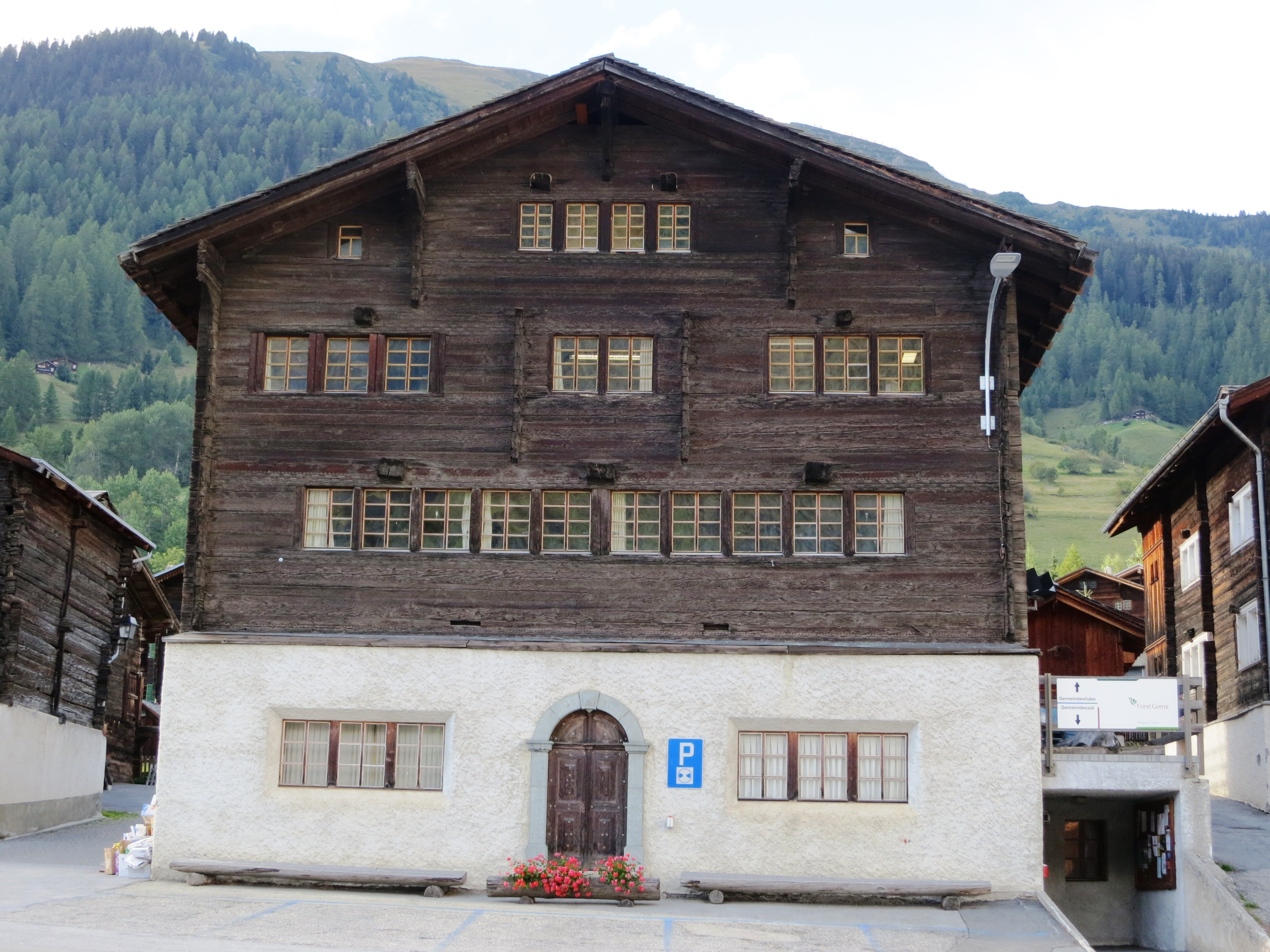 Gemeindehaus, Reckingen VS, Schweiz